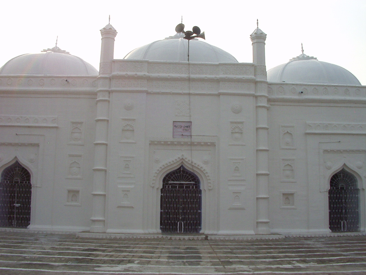 मख्सूस शाह एवं सईद शाह द्वारा निर्मित मस्जिद- 1587 ई॰